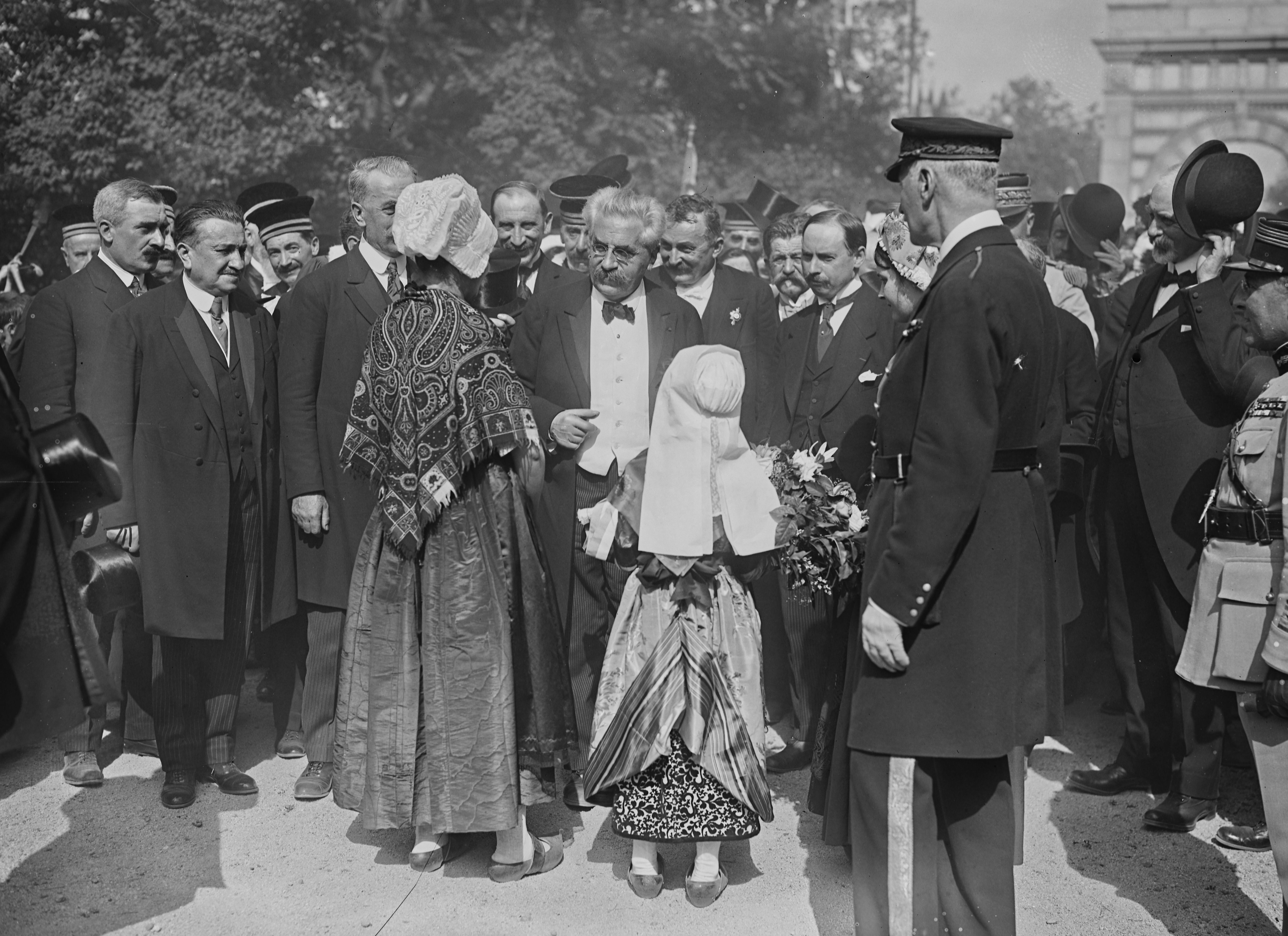 Alexandre Millerand, président de la République française, accueilli à Riom par des femmes en costume auvergnat.